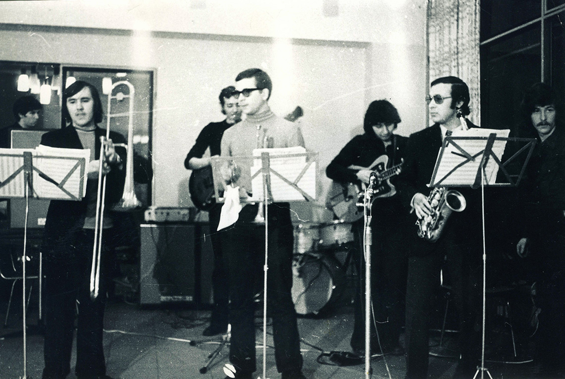 Медная секция в группе